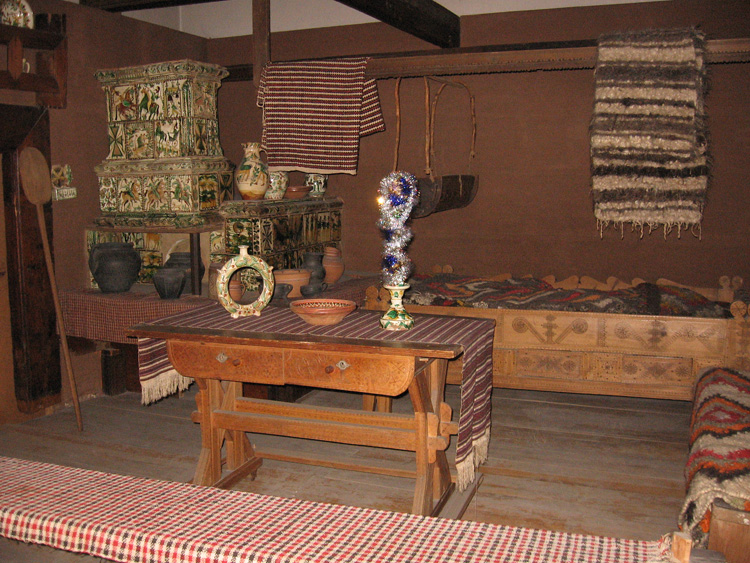 Реконструкция интерьера гуцульской хаты, музей этнографии во Львове